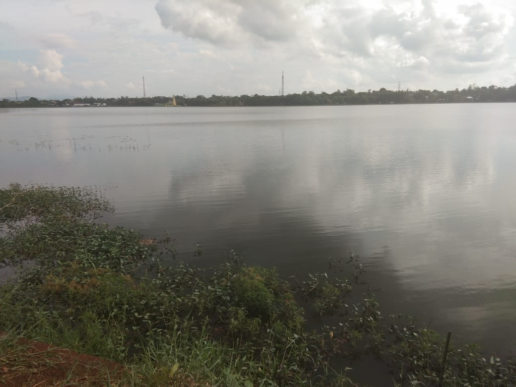 Danau mawang dari arah Macanda